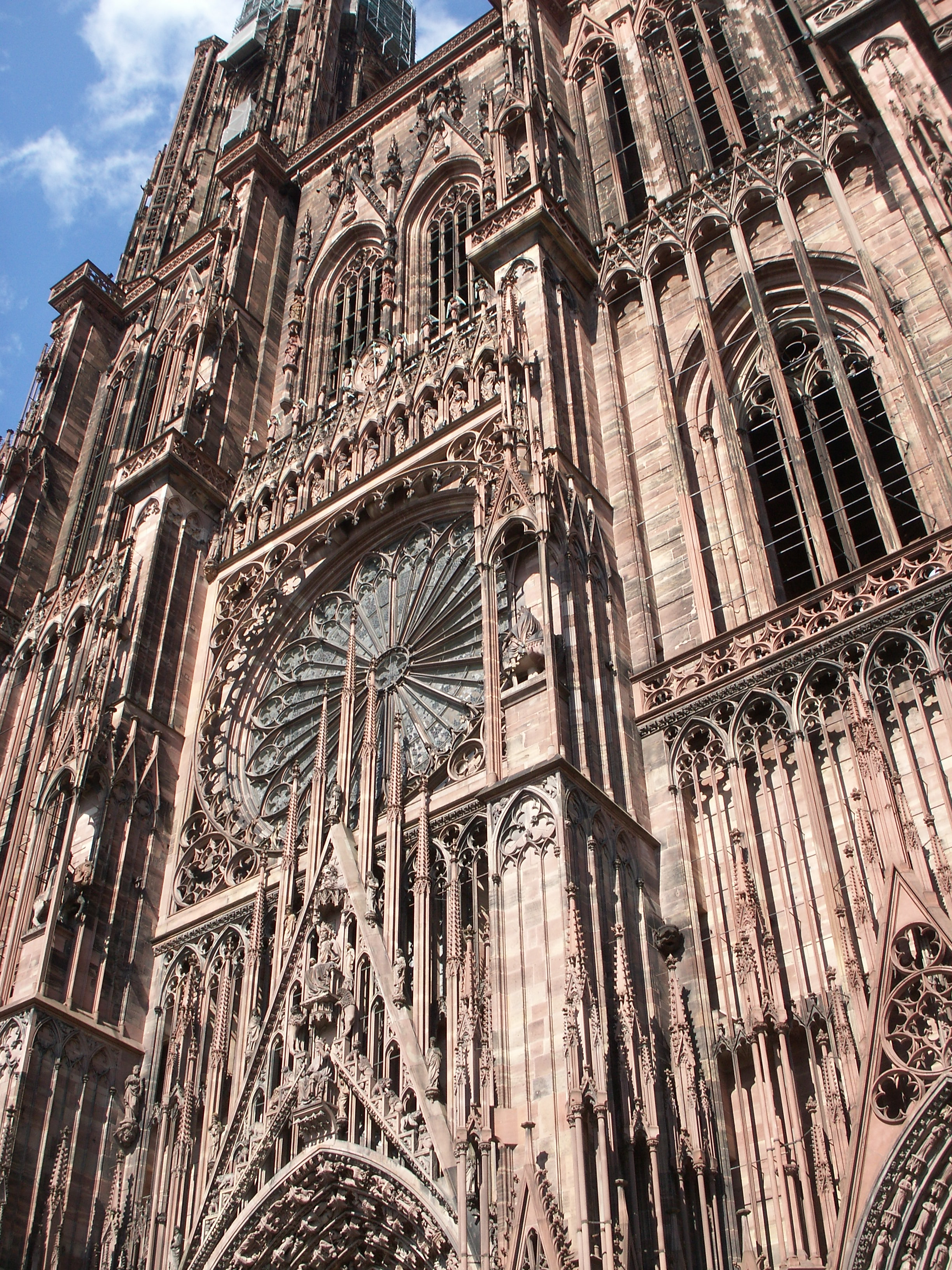 Cathédrale Notre-Dame de Strasbourg, Fassade